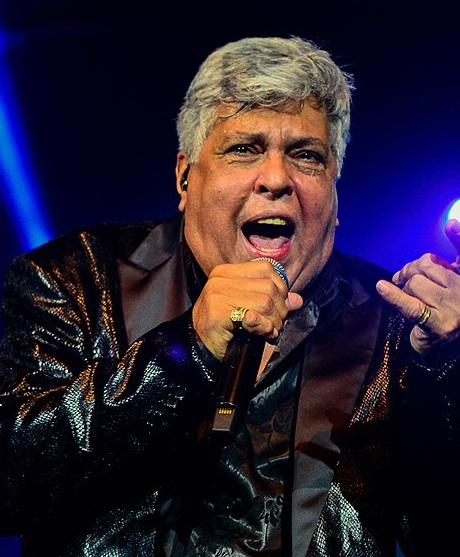 Sidney Magal em 2018